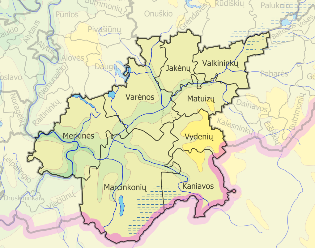 Padaryta iš :image:LietuvosSeniunijos.png